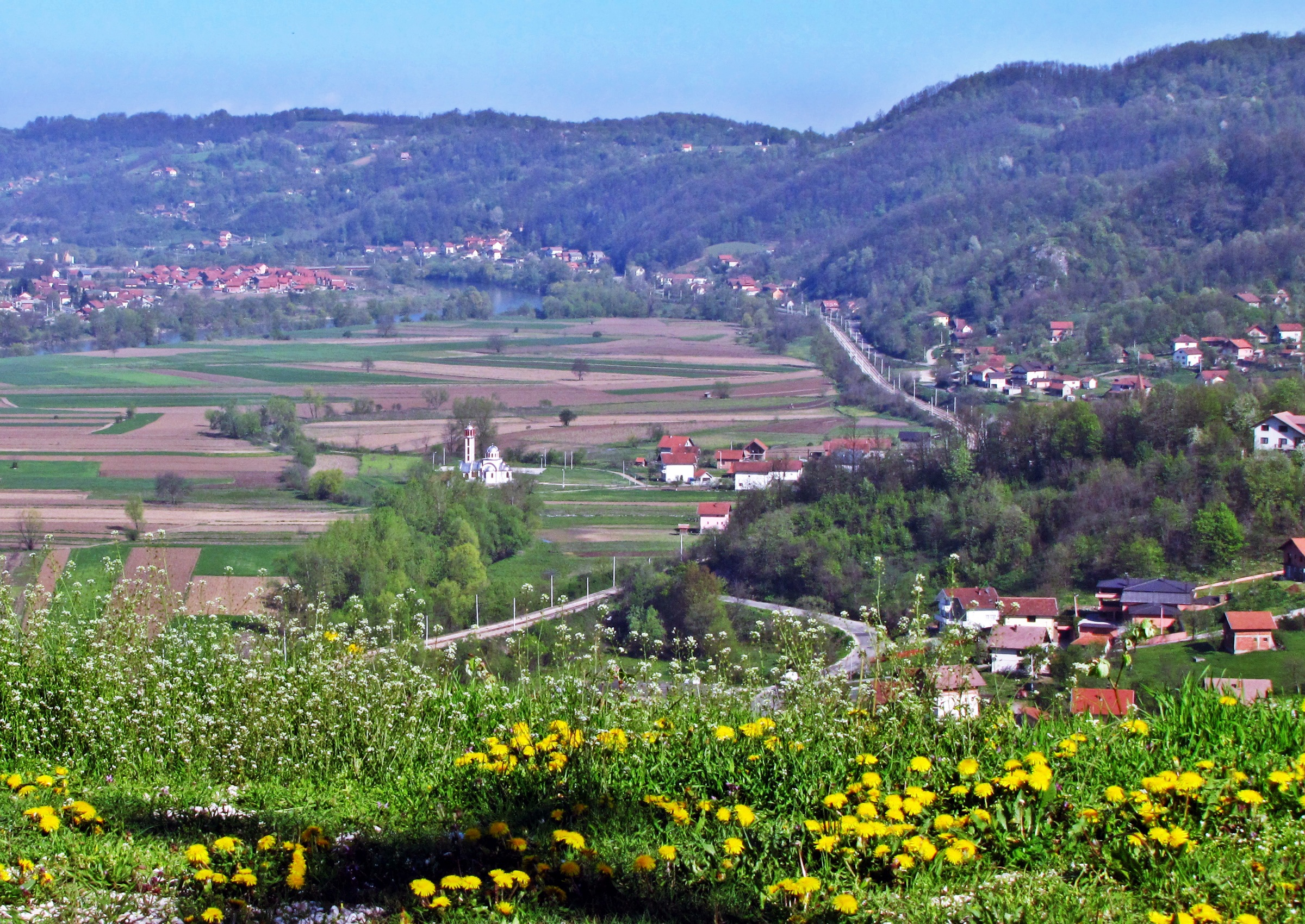 Костајница (Добој)